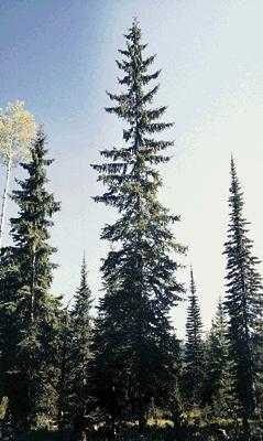 Picea engelmannii (Engelmann spruce)